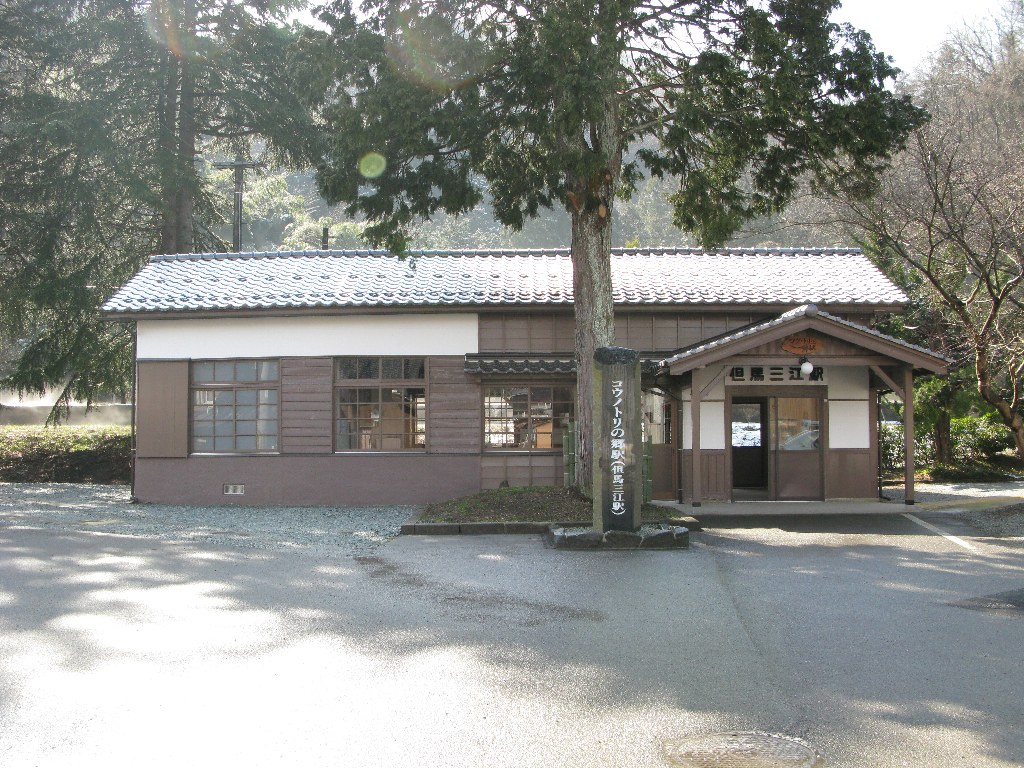 改修後のKTR但馬三江駅駅舎。